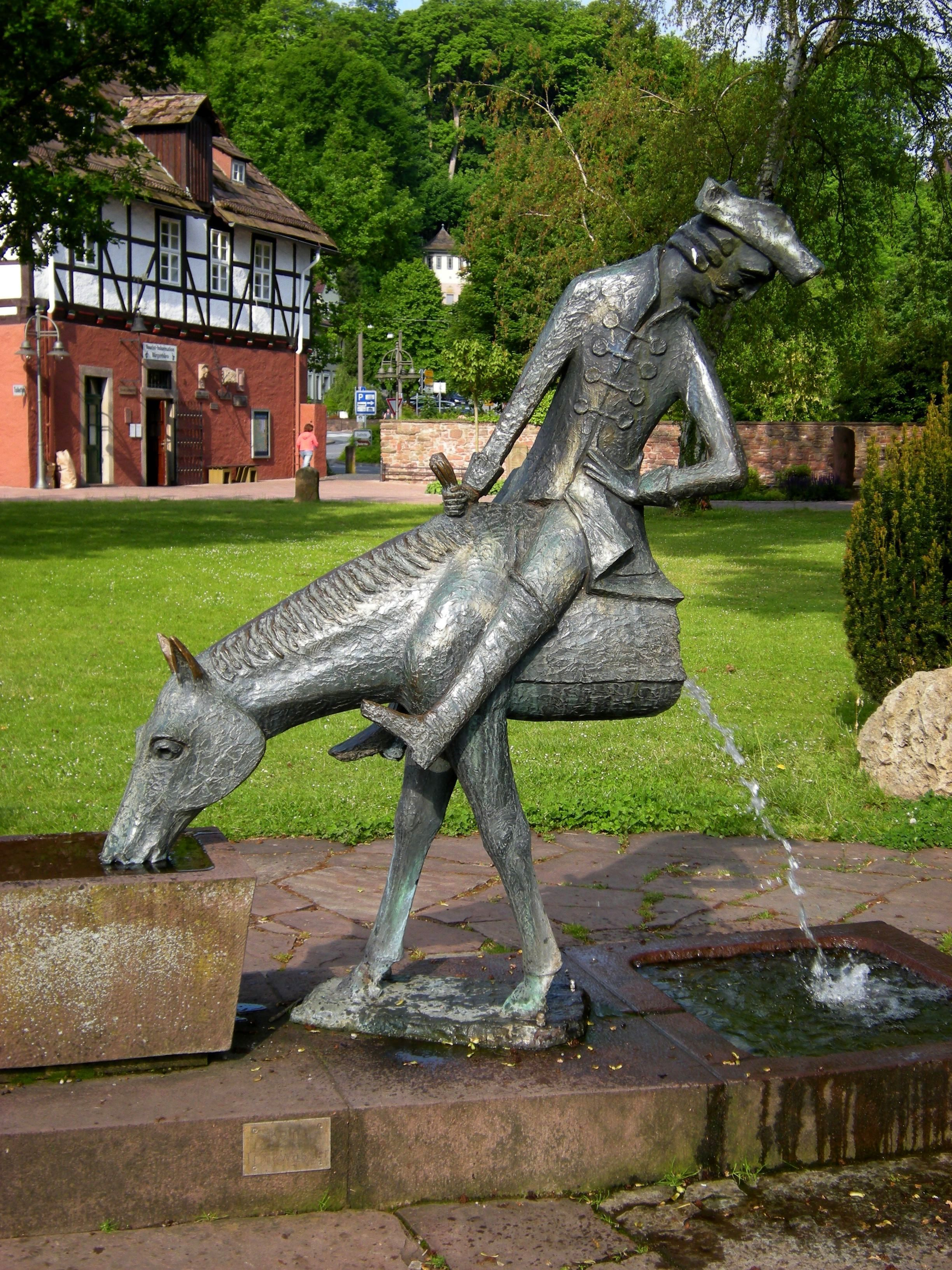 Bodenwerder-Münchhausen-Denkmal.jpg